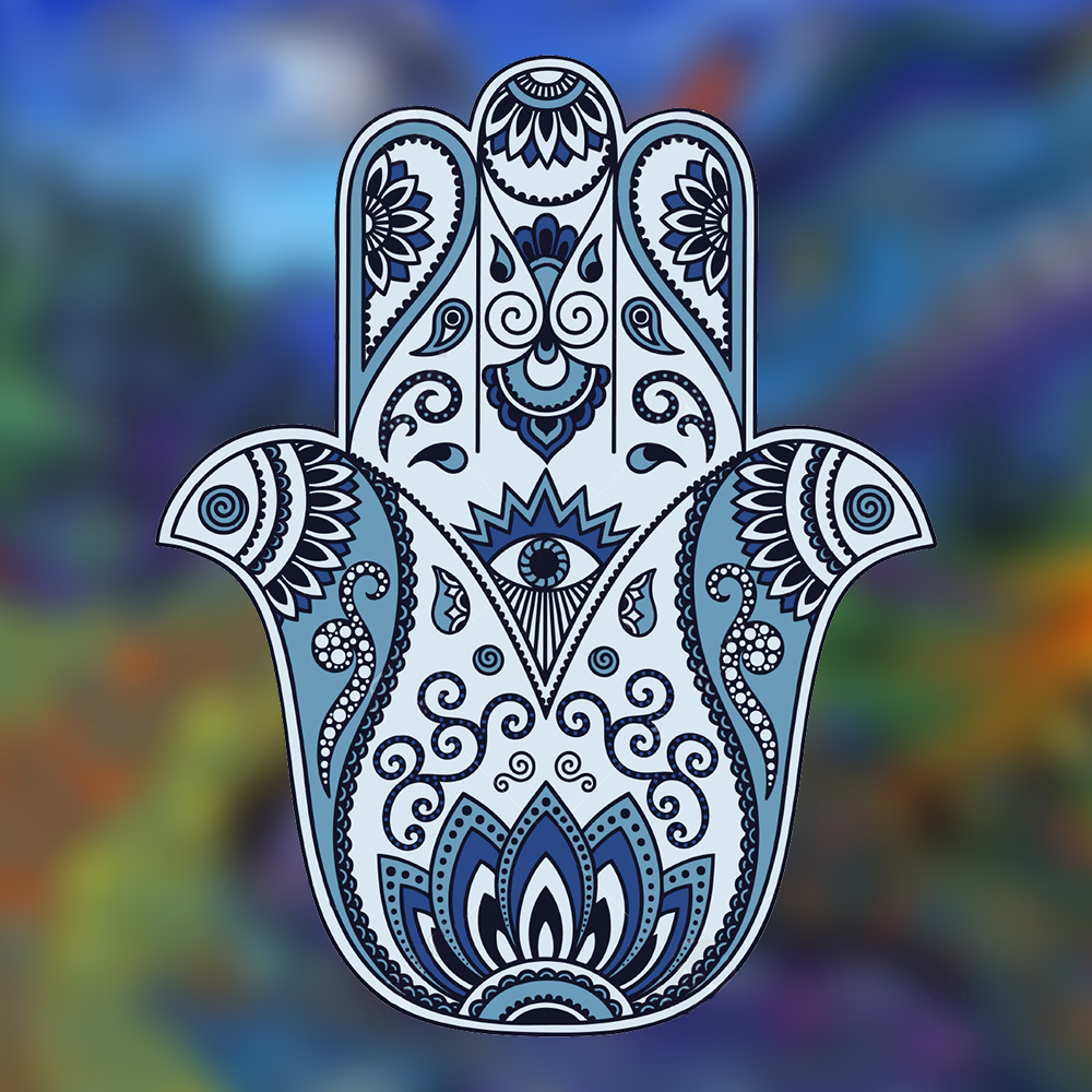 Dibujo de la Mano de Fátima, 2017.